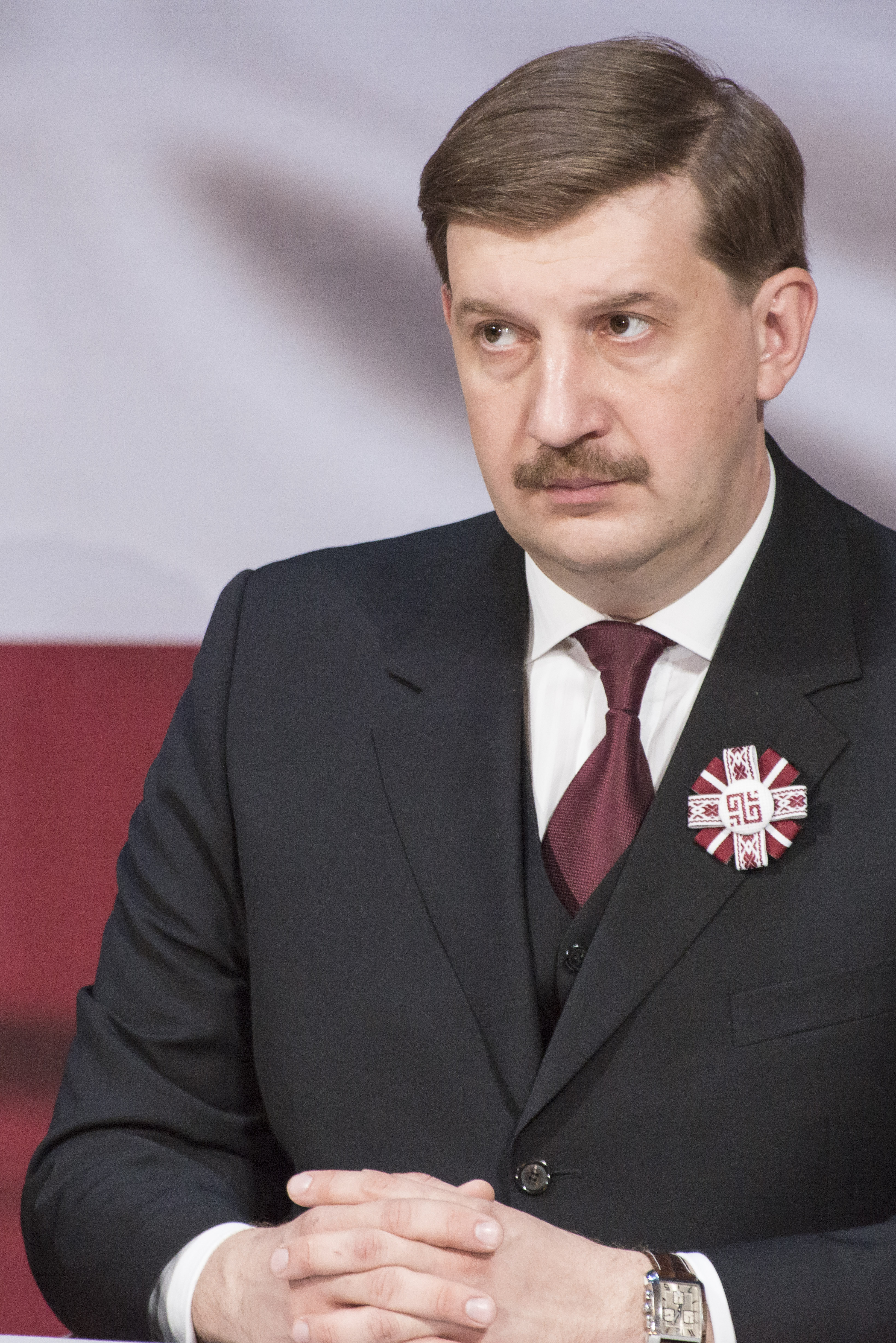 2015.gada 4.maijs. Saeimas svinīgā sēde par godu Latvijas Republikas neatkarības atjaunošanas 25.gadadienai. Foto: Reinis Inkēns, Saeimas Kanceleja Izmantošanas noteikumi: saeima.lv/lv/autortiesibas